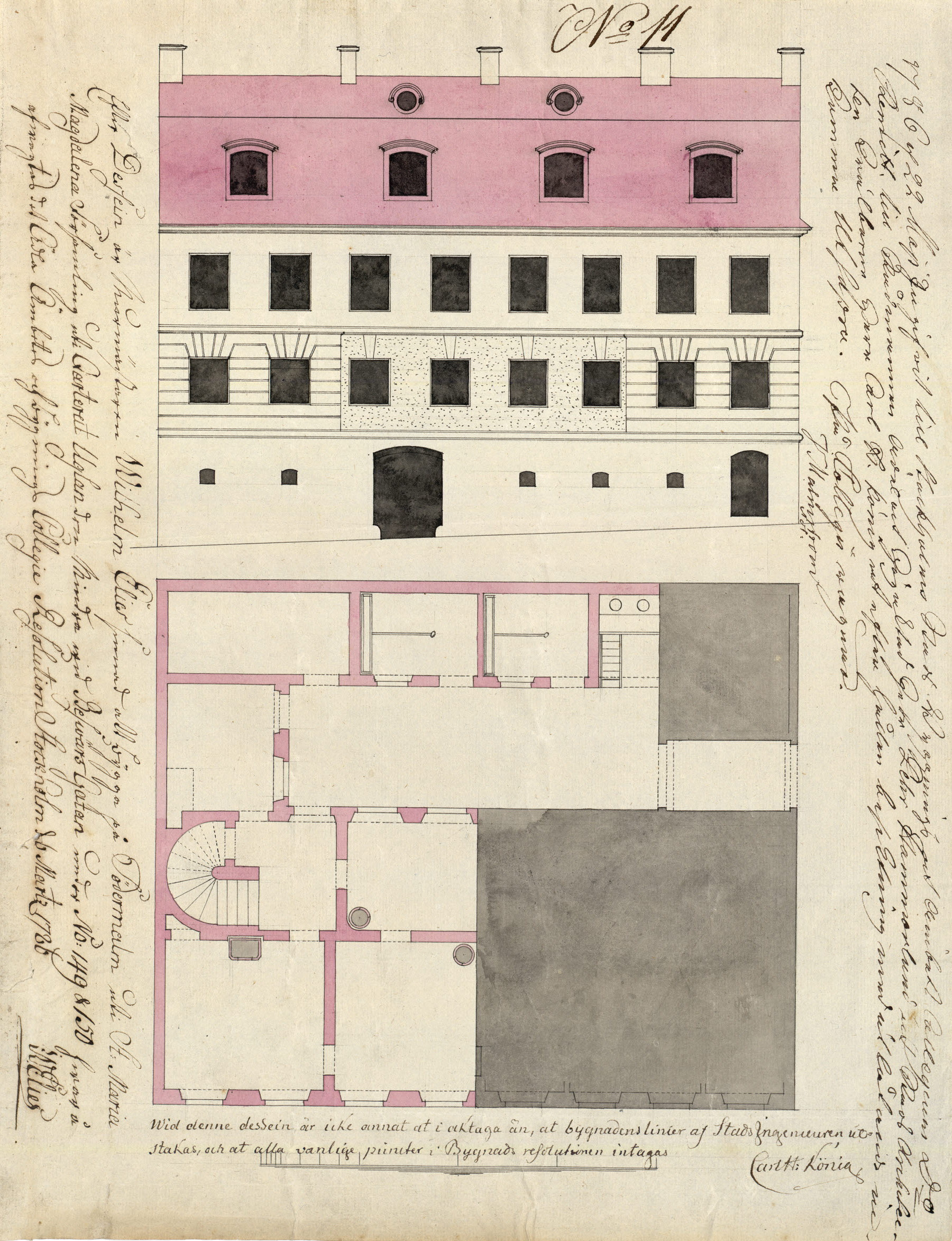 Nybyggnad / tillbyggnad i Kvarteren Ugglan mindre, ritning av Johan Wilhelm Henric Elies